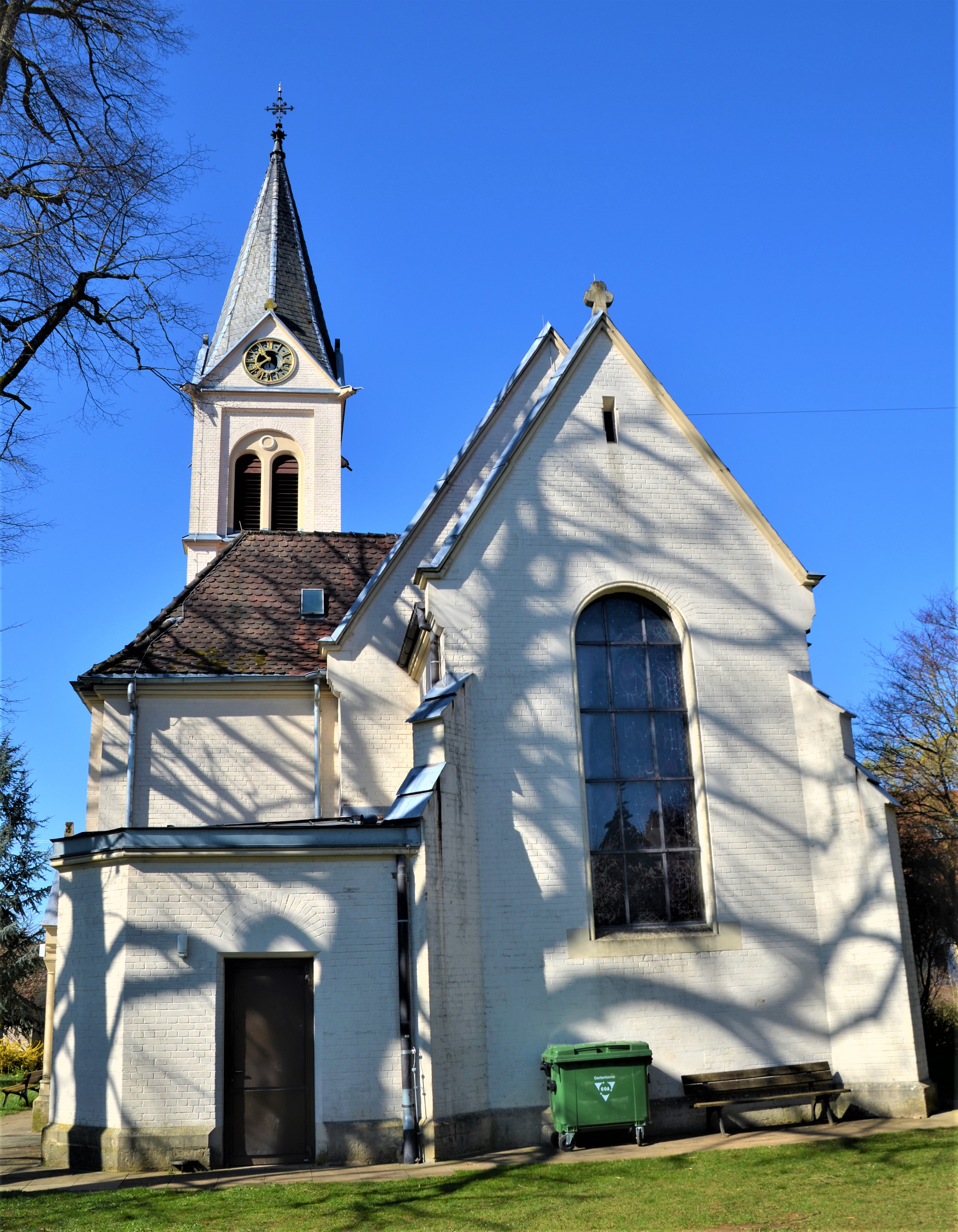 Evangelische Kirche Großdeinbach von Osten